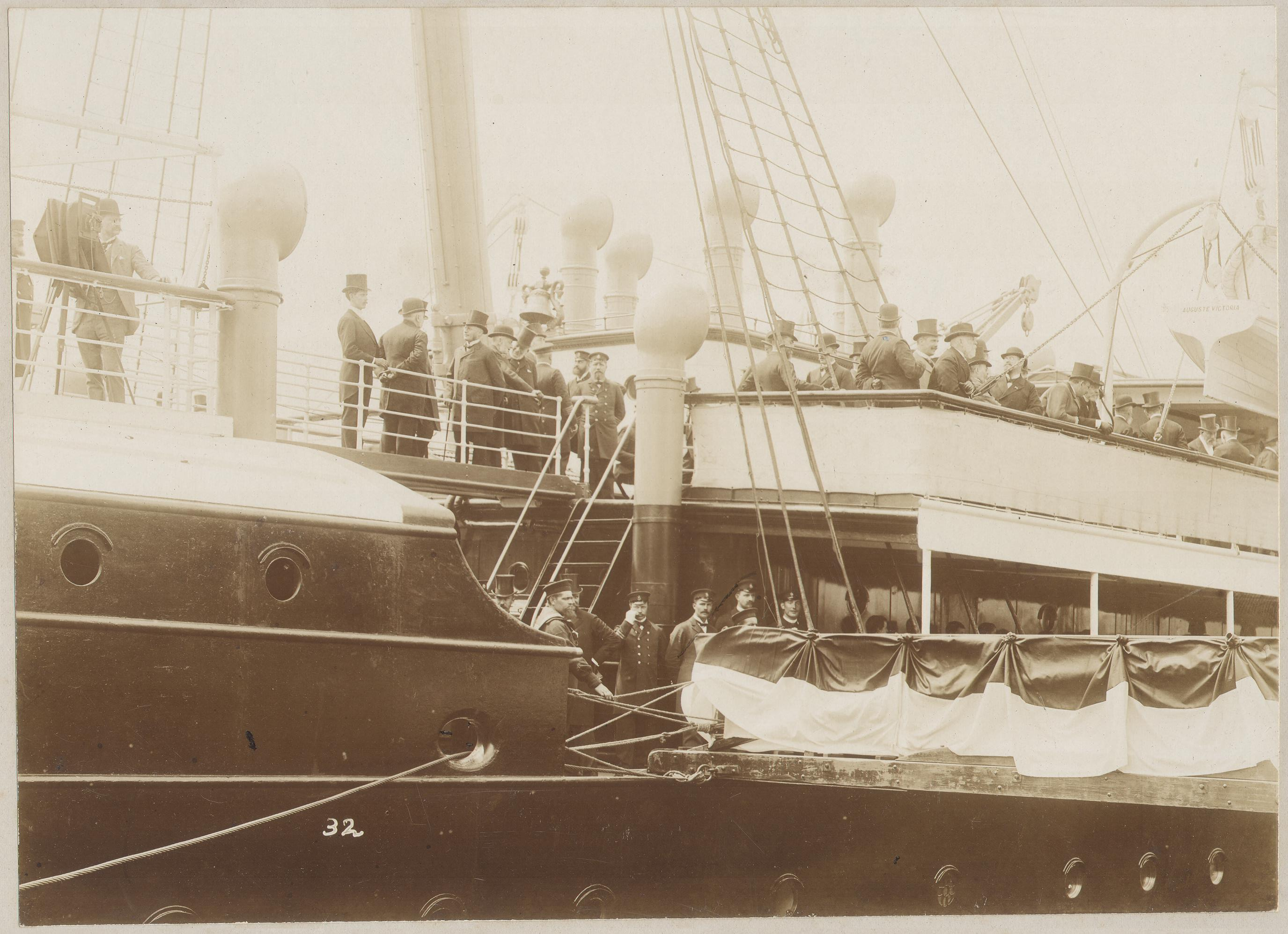 Das 50 jährige Jubiläum der Hamburg-Amerikanischen Packetfahrt-Actien-Gesellschaft. Ankunft Sr. Königl. Hoheit des Prinzen Heinrich, des Hamburger Senats und der Ehrengäste auf der Augusta Viktoria.